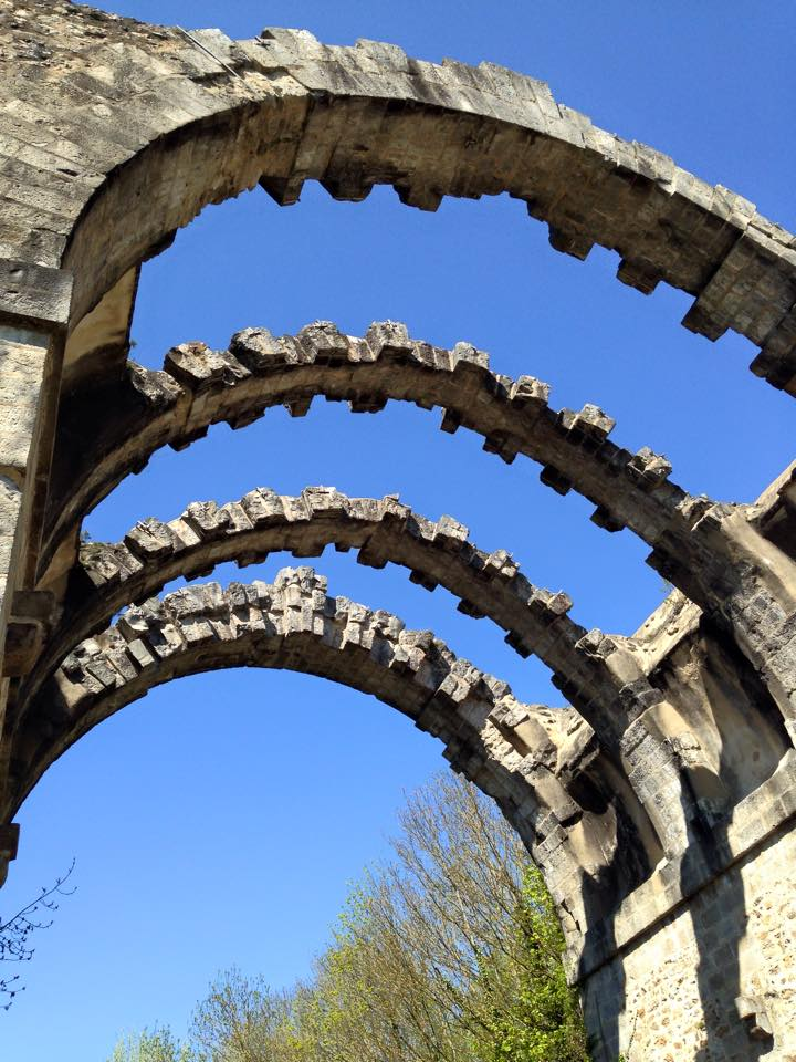 Vue sur les ruines de l'aqueduc de Maintenon